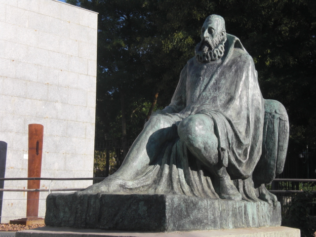 Statuo de Cervantes en Ciudad Real